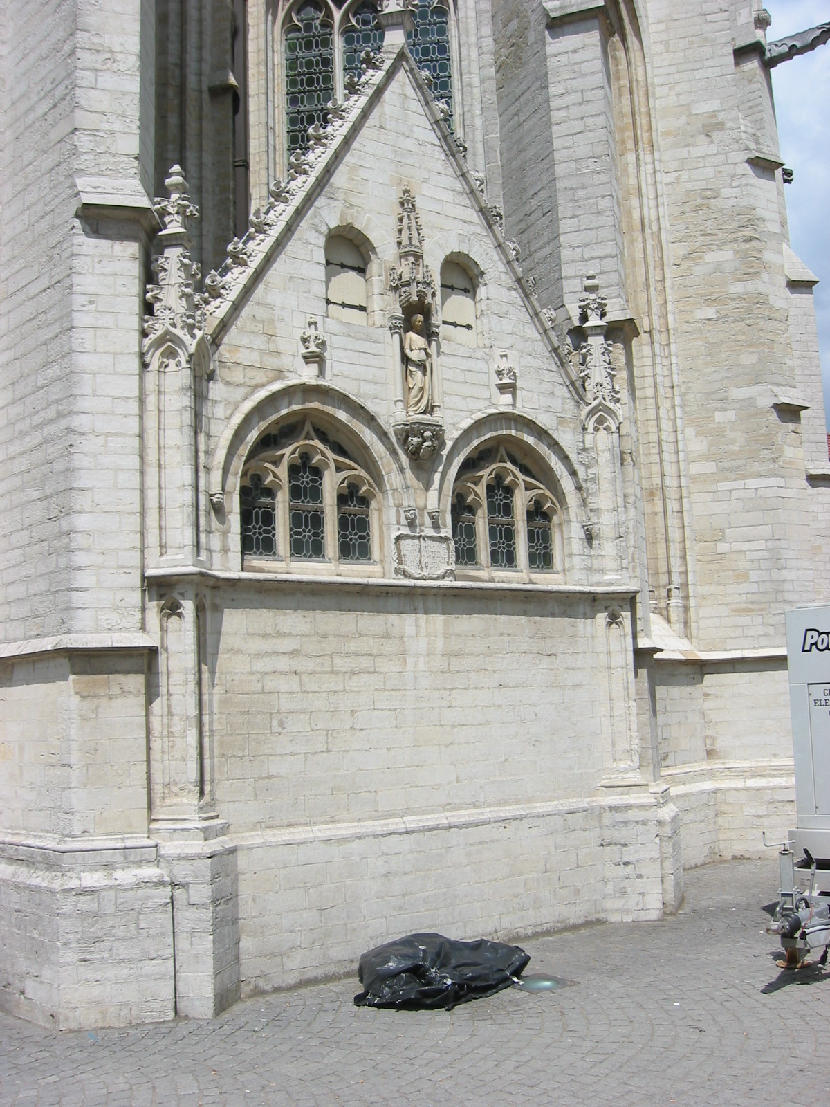 De kapel van Fiere Margriet in de Sint-Pieterskerk te Leuven. (Gemaakt in juni 2006)